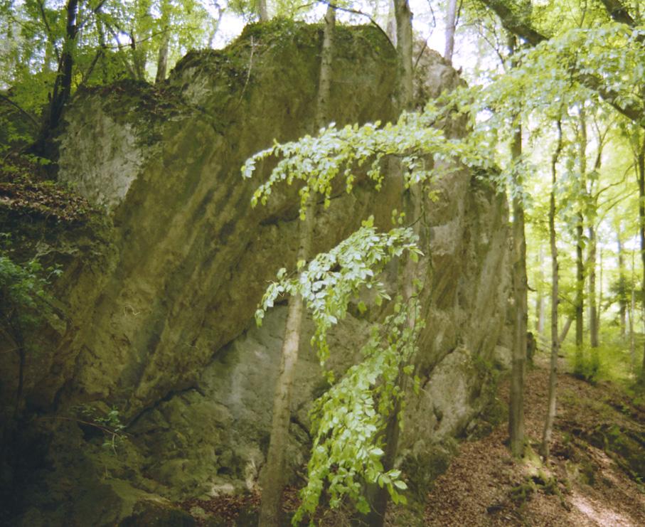 Burgfelsen der Ruine Fuerstenstein, Ettingen, Schweiz